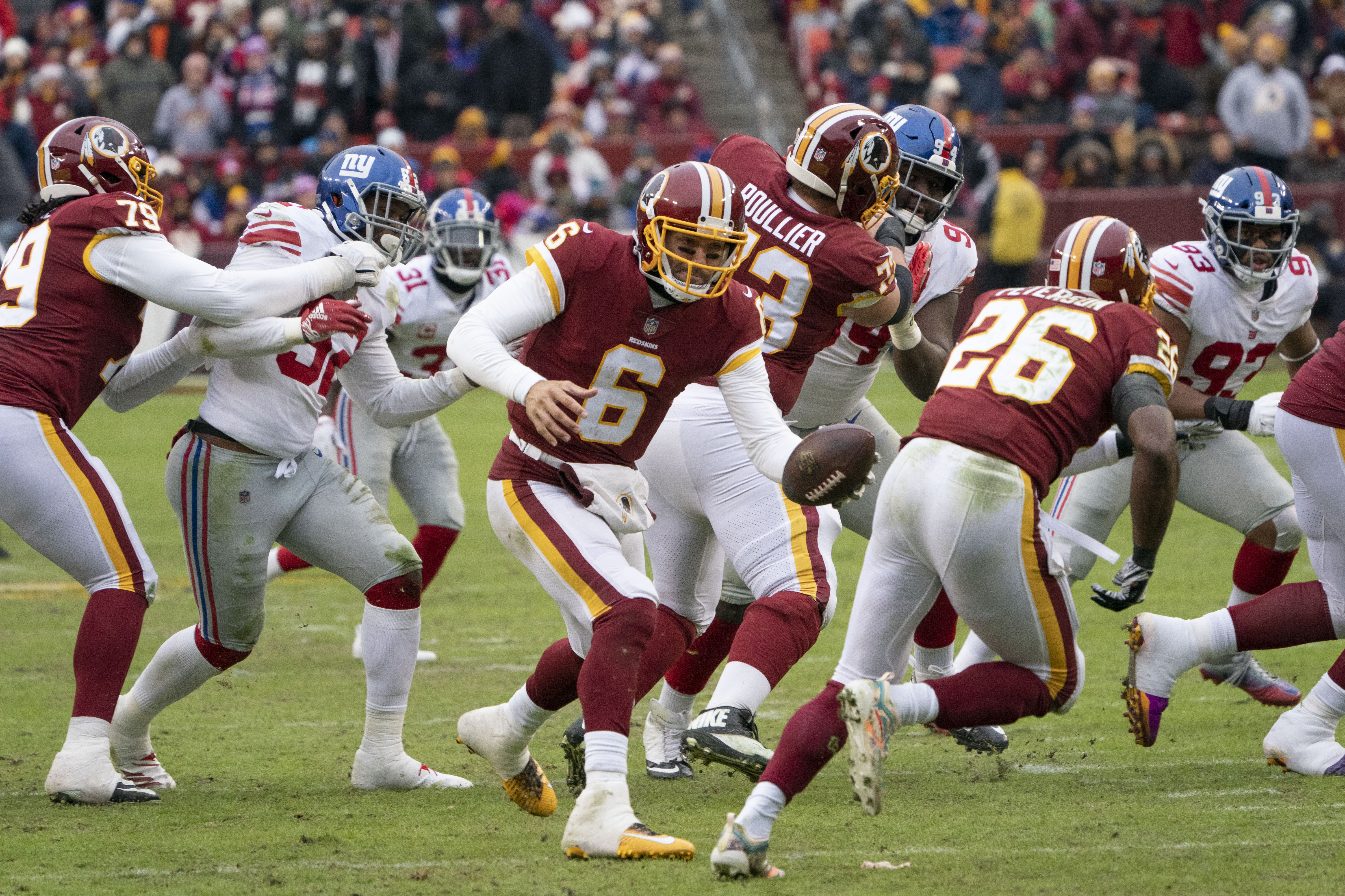 Giants at Redskins 12/09/18